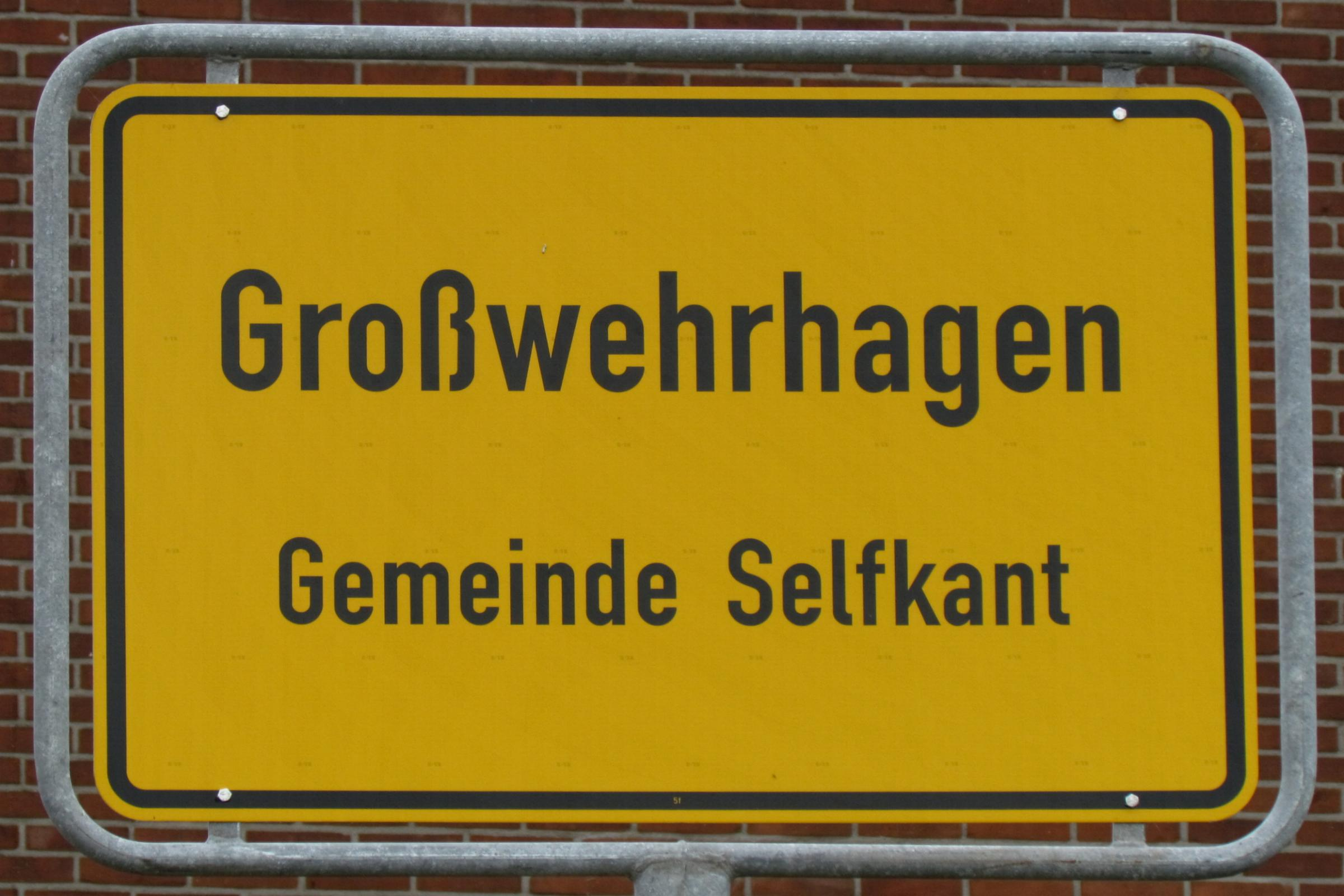 Großwehrhagen Ortsschild